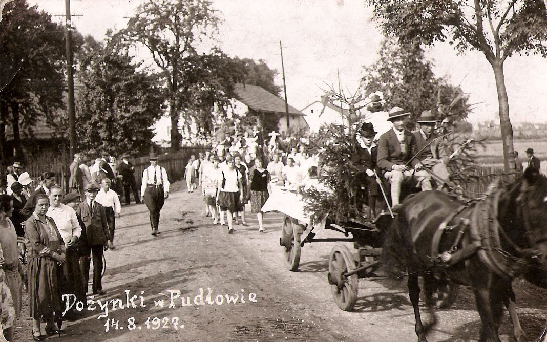 Dożynki (Polish harvest festival) in Pudłów (Pudlov), Cieszyn Silesia, Czechoslovakia